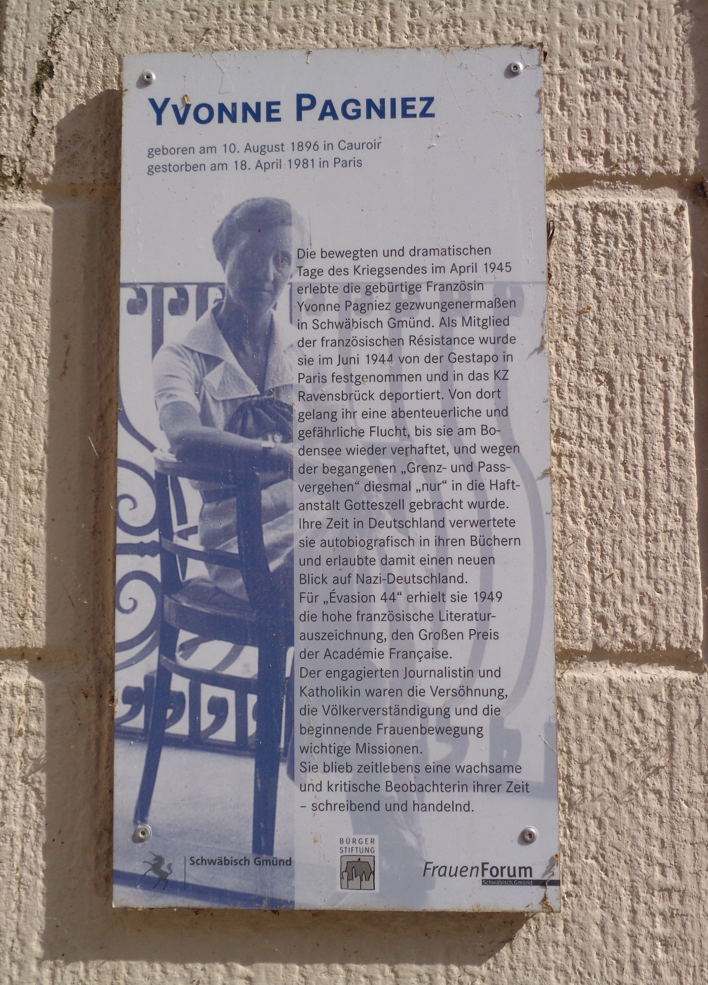 Gedenktafel für Yvonne Pagniez in Schwäbisch Gmünd im Rahmen der "Frauenwege". Standort Kapitelshaus, Münsterplatz 7